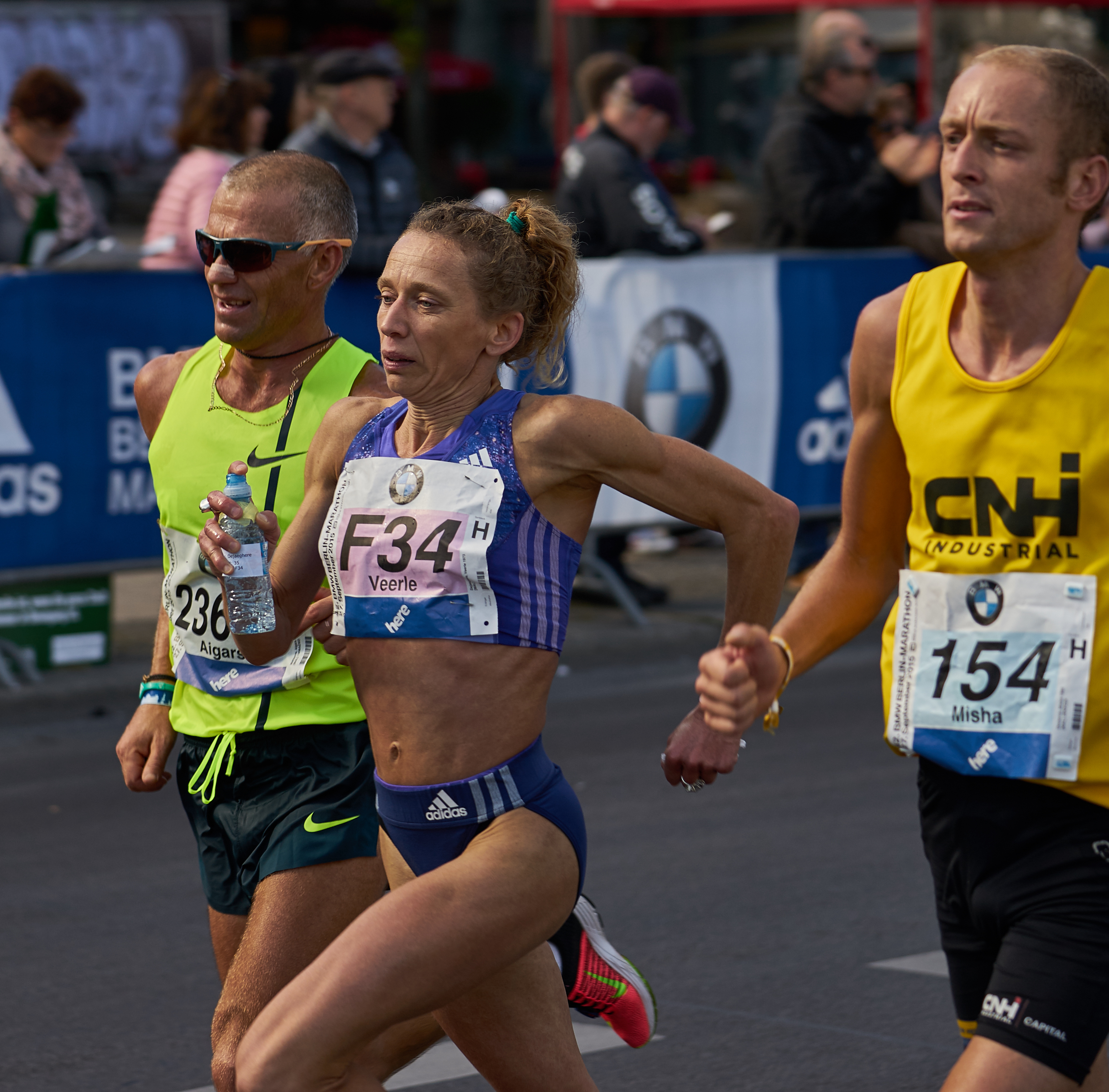 Berlin Marathon 2015 Dejaeghere, Veerle (BEL)